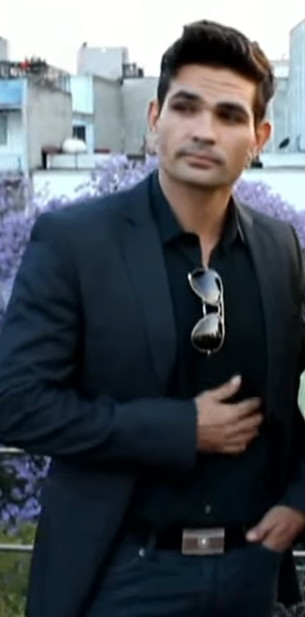 G7Magazine.MX: Ferdinando Valencia